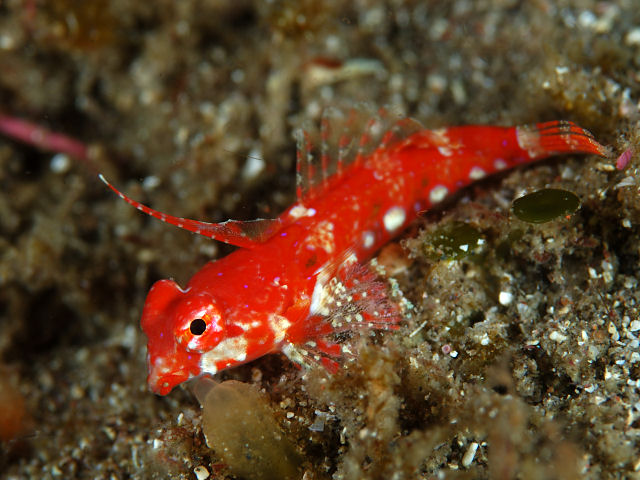 アカオビコテグリ Synchiropus sp. (synonym: Neosynchiropus sp.)[1]